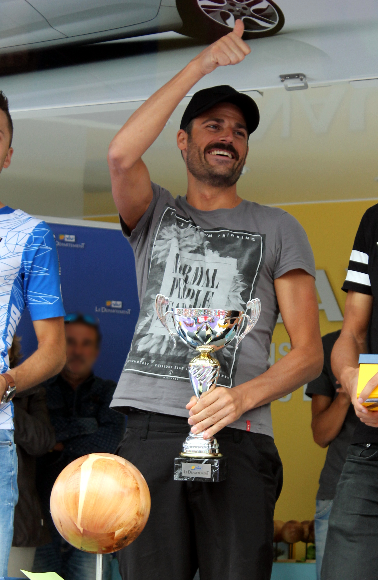 Mike Aigroz. Vainqueur Naturman 2015